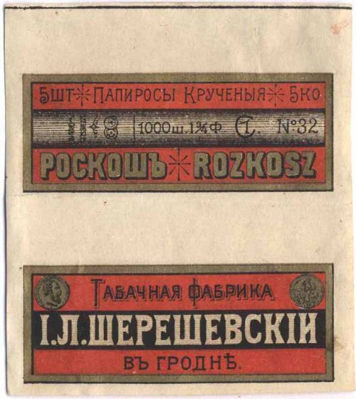 Музей: Гродзенскі дзяржаўны гісторыка-археалагічны музей Тып: пісьмовыя крыніцы Від: друкаваныя выданні Прадметнае імя: этыкетка Назва/аўтарская назва: "Папиросы крученыя "Роскошъ" "Roskosz" Калектыўныя аўтары: Тытунёвая фабрыка І.Л.Шэрашэўскага; Матэрыялы: папера; Тэхналогіі стварэння: друк; Дата стварэння: кан. XIX - пач. XX стст. Месца стварэння: Расійская імперыя, Гродна Памеры: 9,4 х 8,3 см